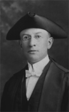 Edgar Nelson Rhodes, ancien premier ministre de la Nouvelle-Écosse, député fédéral et sénateur